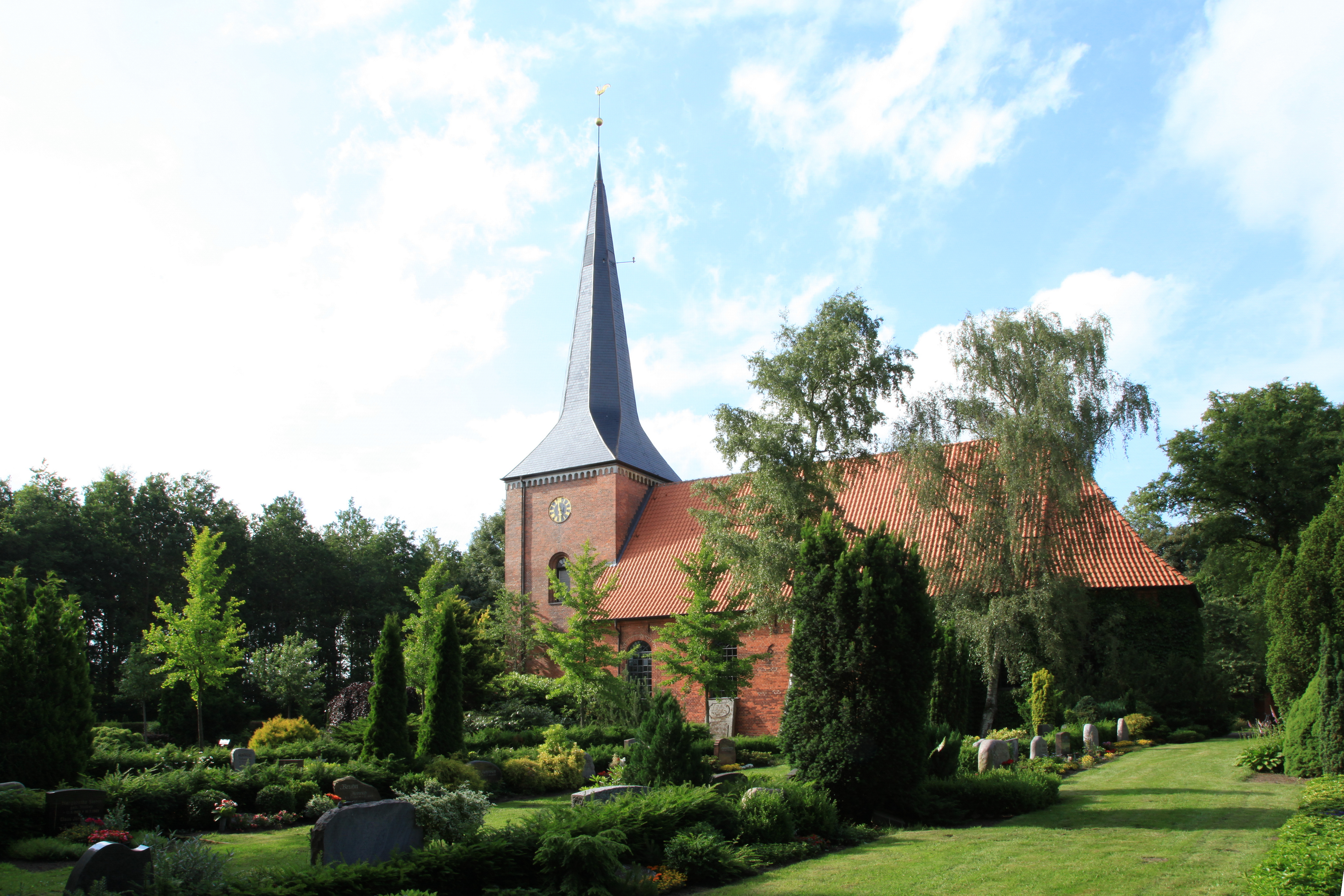 Friedhof (Kirchhof) und Marienkirche an der Hauptstraße in Hohn